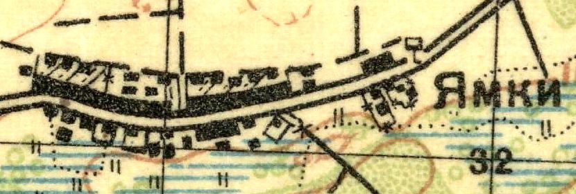 Топографическая карта Ленинградской области, квадрат О-35-23-Г (Волосово), деревня Ямки